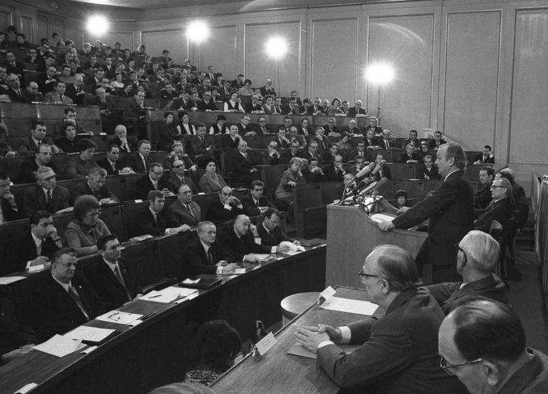 Berlin, 4. Tagung der Volkskammer ADN-ZB/Spremberg/9.3.72/Berlin: 4. Tagung der Volkskammer der DDR am 9.3.72. Der Minister für Gesundheitswesen der DDR, Prof. Dr. Ludwig Mecklinger, sprach zum Tagesordnungspunkt 1 "Begründung des Gesetzes über die Unterbrechung der Schwangerschaft". Abgebildete Personen: Mecklinger, Ludwig: Minister für Gesundheitswesen, Mitglied des ZK der SED, DDR (GND 106053248) Honecker, Erich: Staatsratsvorsitzender, Generalsekretär des ZK der SED, DDR (GND 118553399) Stoph, Willi: Ministerpräsident, Staatsratsvorsitzender, Armeegeneral, SED, DDR (GND 118975714) Sindermann, Horst: Volkskammerpräsident, stellvertretender Staatsratsvorsitzender, DDR (GND 12996218X) Mittag, Günter Dr.: Stellvertretender Staatsratsvorsitzender, Politbüro des ZK der SED, FDGB, DDR (GND 11897629X)